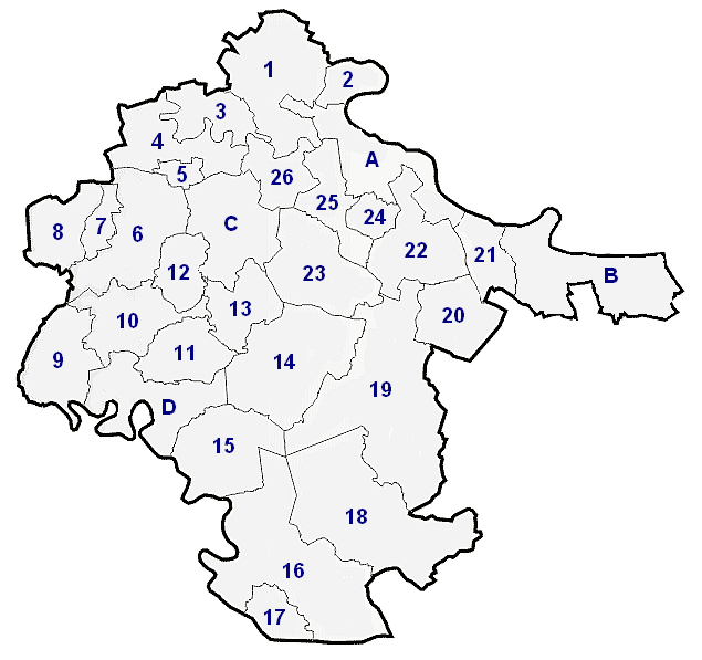 Map of Vukovar-Syrmia County in Croatia Category:Maps of Croatia A - Town of Vukovar (county seat) B - Town of Ilok C - Town of Vinkovci D - Town of Županja Trpinja Borovo Tordinci Markušica Jarmina Ivankovo Vođinci Stari Mikanovci Babina Greda Cerna Gradište Andrijaševci Privlaka Otok Bošnjaci Drenovci Gunja Vrbanja Nijemci Tovarnik Lovas Tompojevci Stari Jankovci Negoslavci Bogdanovci Nuštar